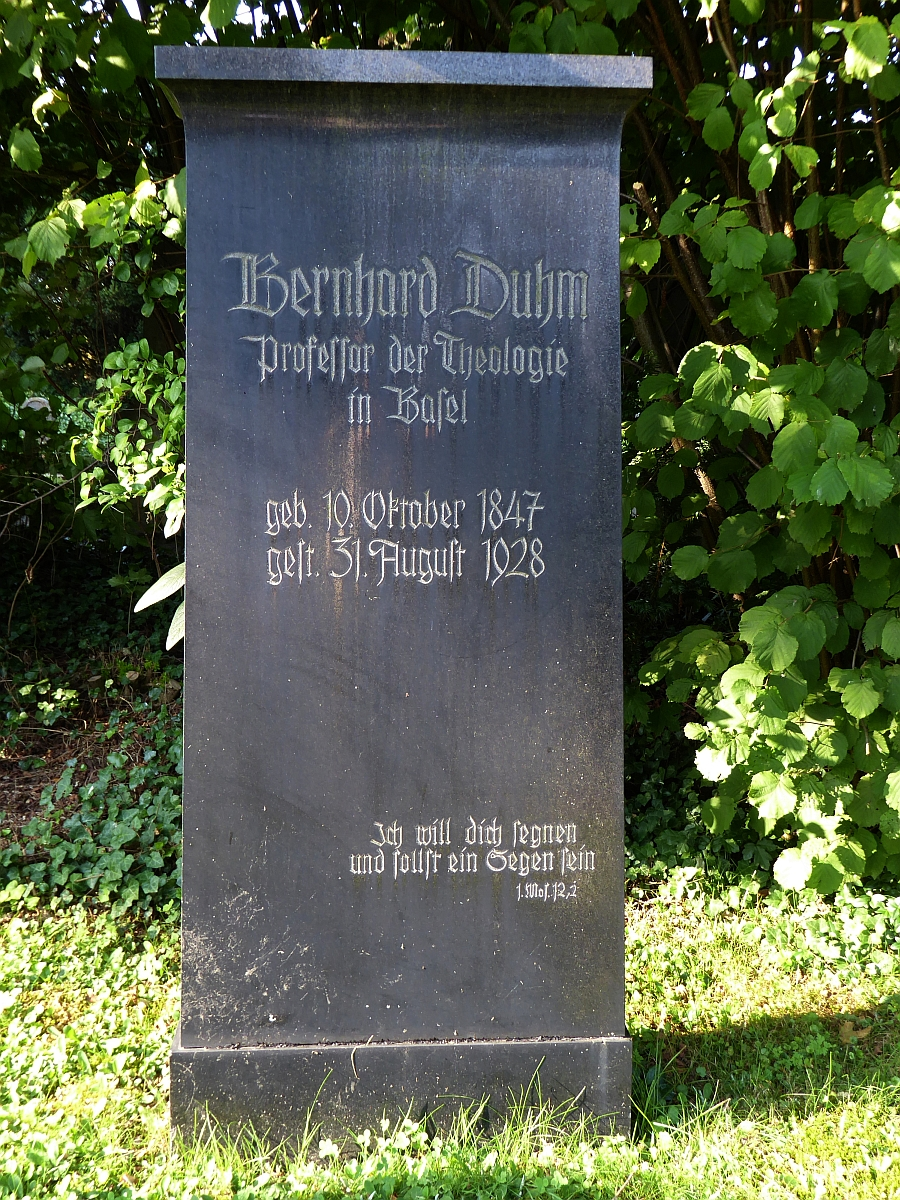 Bernhard Duhm (1847–1928) Theologe, Grab auf dem Friedhof Wolfgottesacker, Basel